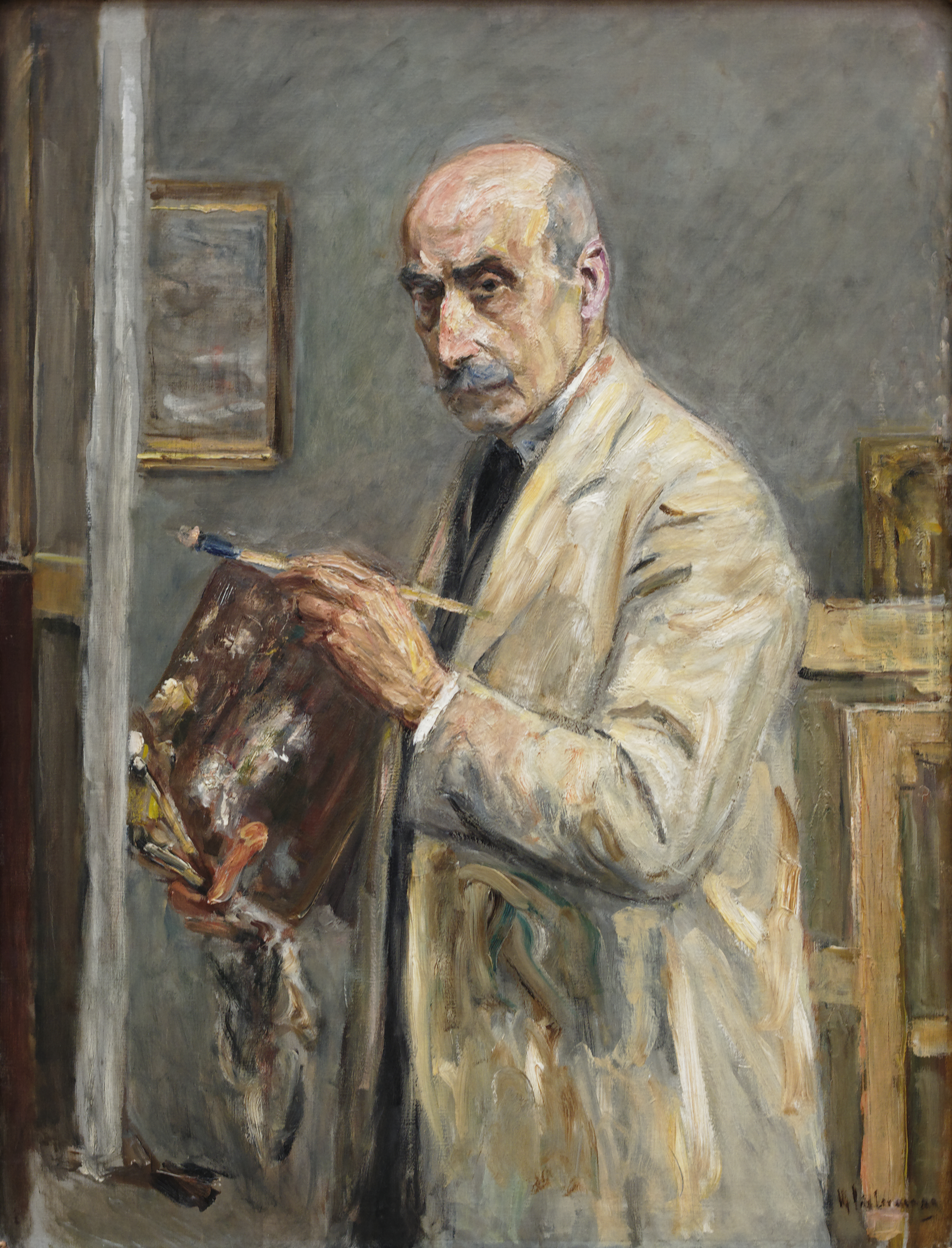 Autoportrait dans l'atelier. Max Liebermann, 1922. Exposée à la Neue Pinokothek, Munich.